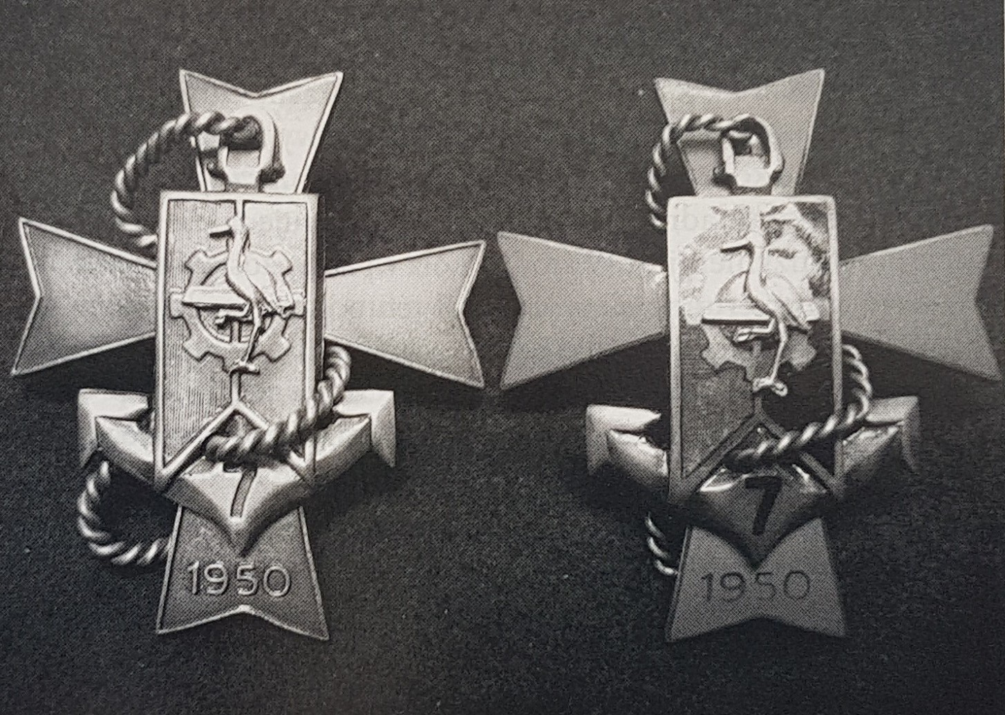 Odznaka honorowa 7 OSSIiMW Drawno